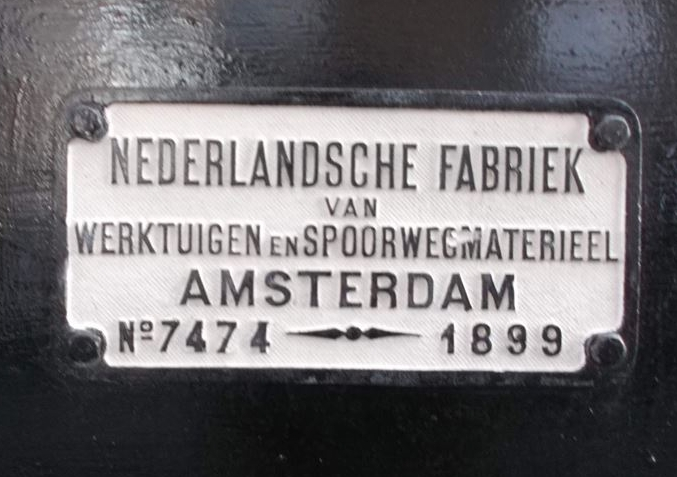 Motor van werkspoor, Valkenburg (Katwijk). Nederlandsche fabriek van werktuigen en spoorwegmaterieel Amsterdam, 1899